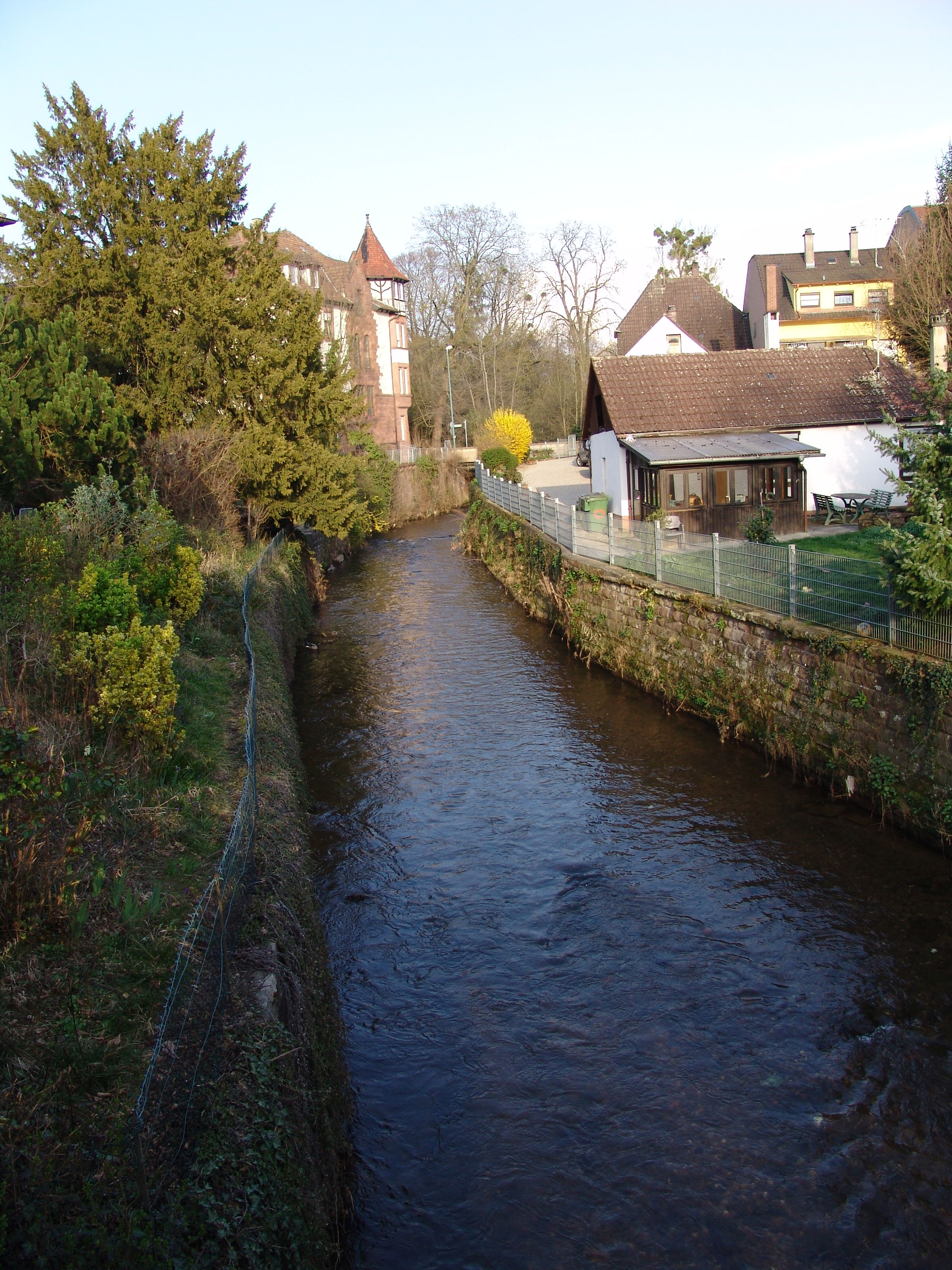 Die Schutter von der Brücke im Bädleweg mit Blick nach Osten